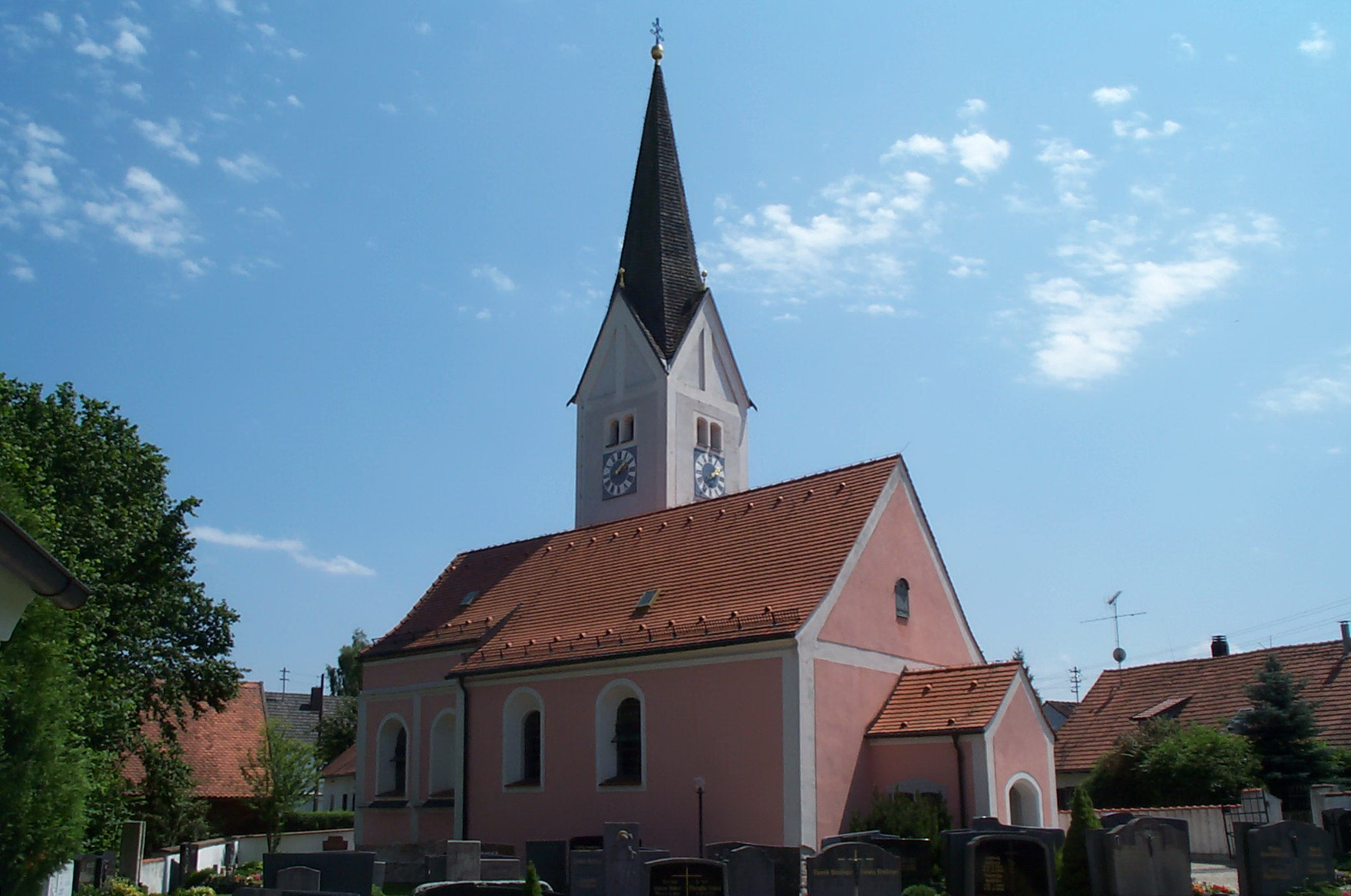 Herrngiesdorf, Bernhardstraße 23-25. Katholische Kirche St. Martin. Saalkirche mit Satteldach und eingezogenem, fünfseitig geschlossenem Chor. Flankenturm mit Spitzhelm nach Süden. Langhaus und Turm romanisch, wohl 13. Jahrhundert, Chor spätgotisch, wohl 1505/06. Barocker Ausbau um 1735/40. Spitzhelm von 1864; mit Ausstattung.